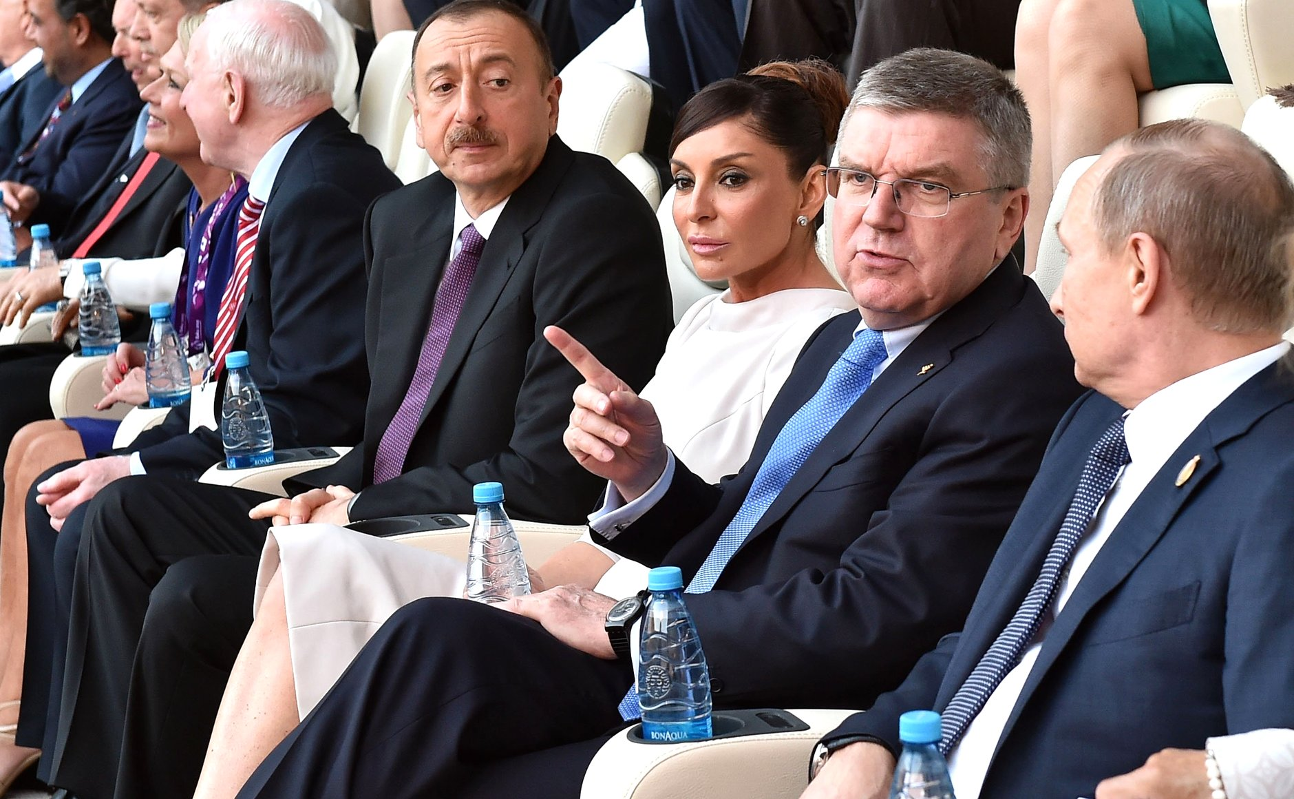 Церемония открытия Первых Европейских игр. Президент Азербайджана Ильхам Алиев с супругой и глава Международного олимпийского комитета Томас Бах, Президент России Владимир Путин (слева направо)